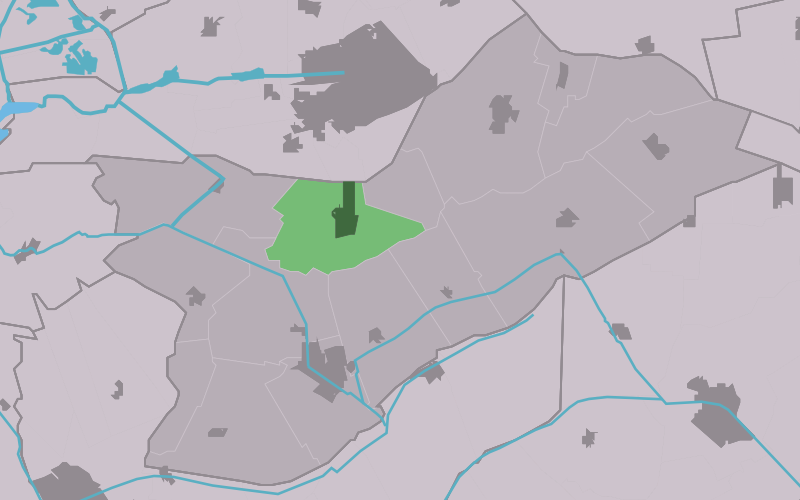 Kaartsje fan himrik fan Beetstersweach